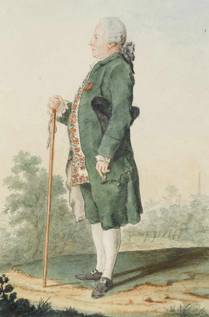 Dominique Joseph, marquis de Cassini (1715-1790), exempt des gardes du corps du roi, maréchal des camps et armées du roi